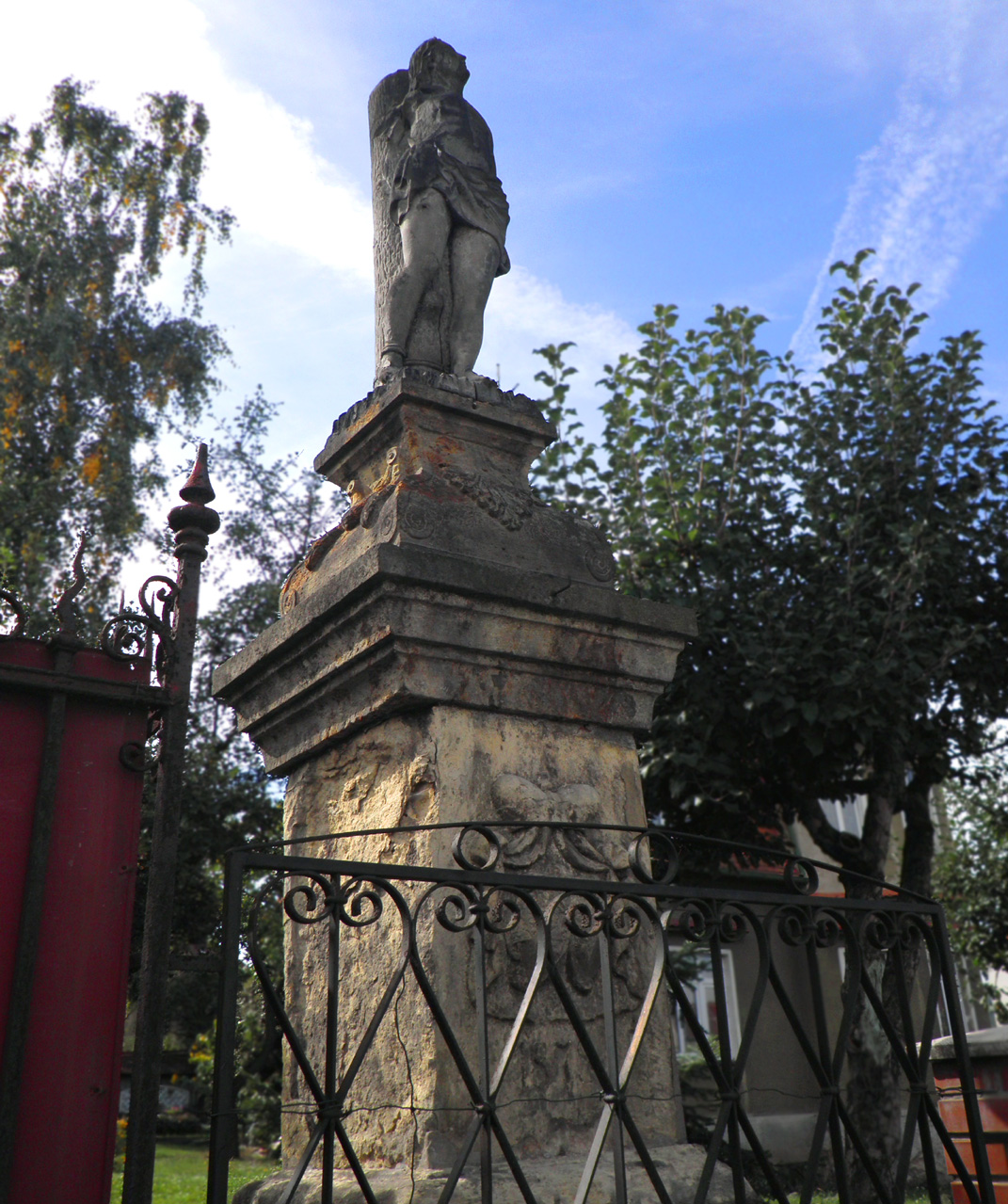 Socha sv. Šebestiána (Bílina), Pražská, Bílina